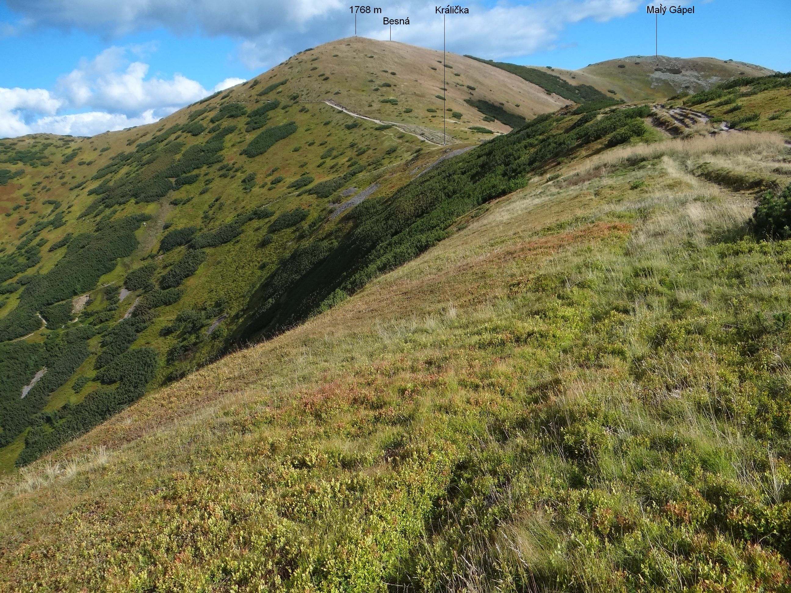 Besná